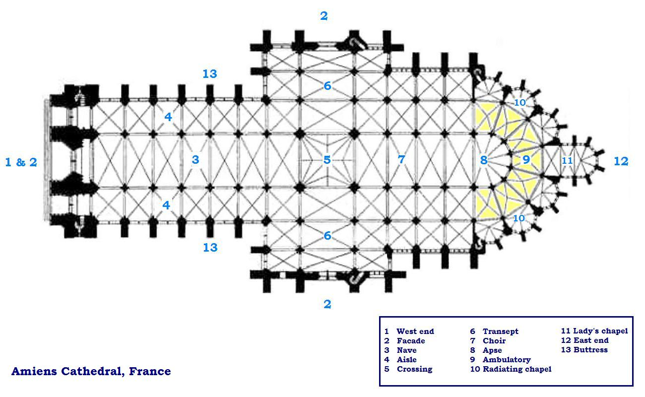 Amiens. Floorplan, from G. Dehio and G. von Bezold, Die Kirchliche Baukunst des Abendlandes, Stuttgart, 1887-1902, plate 363 Lithograph